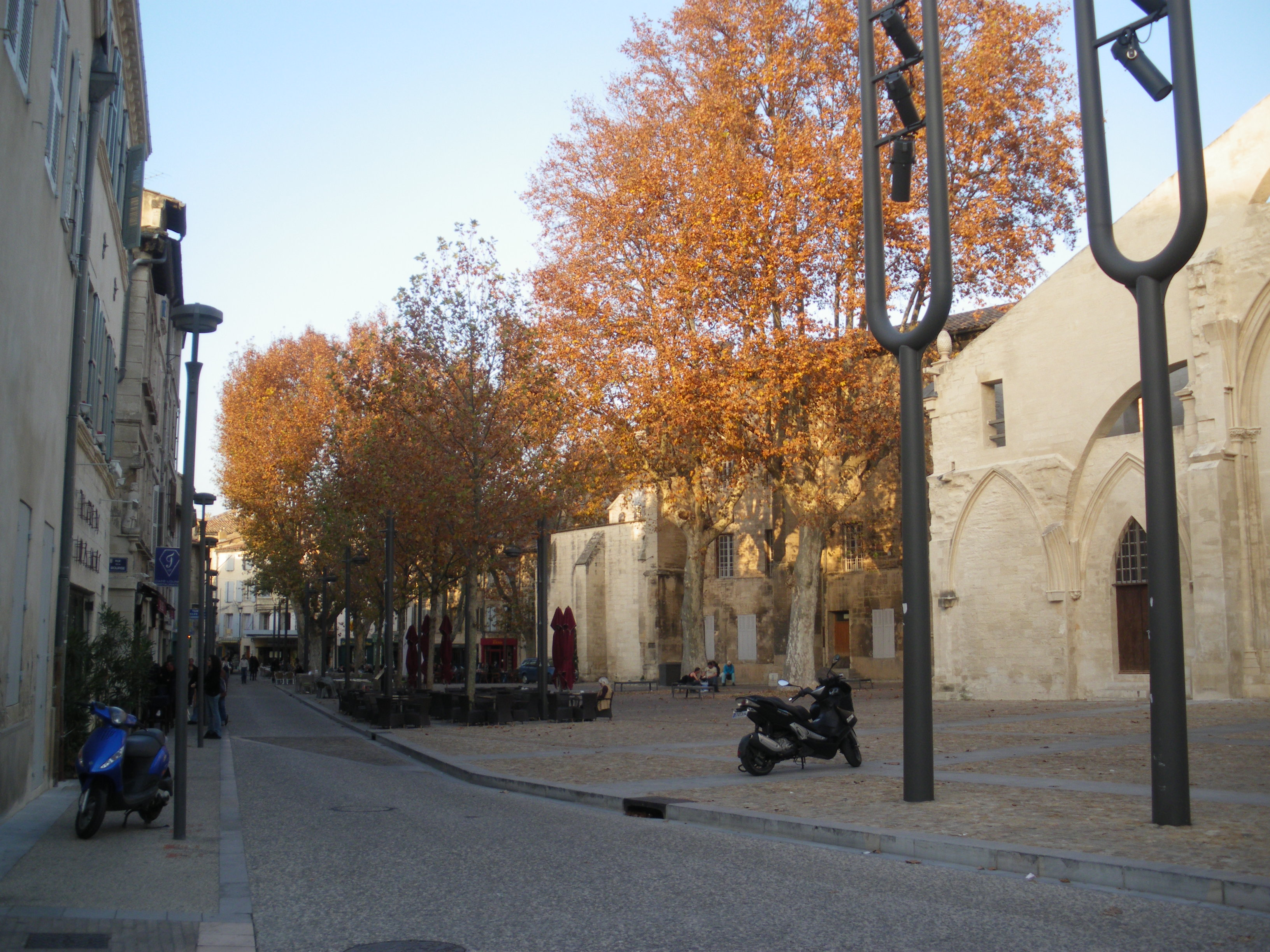 Place des Corps Saints, Avignon